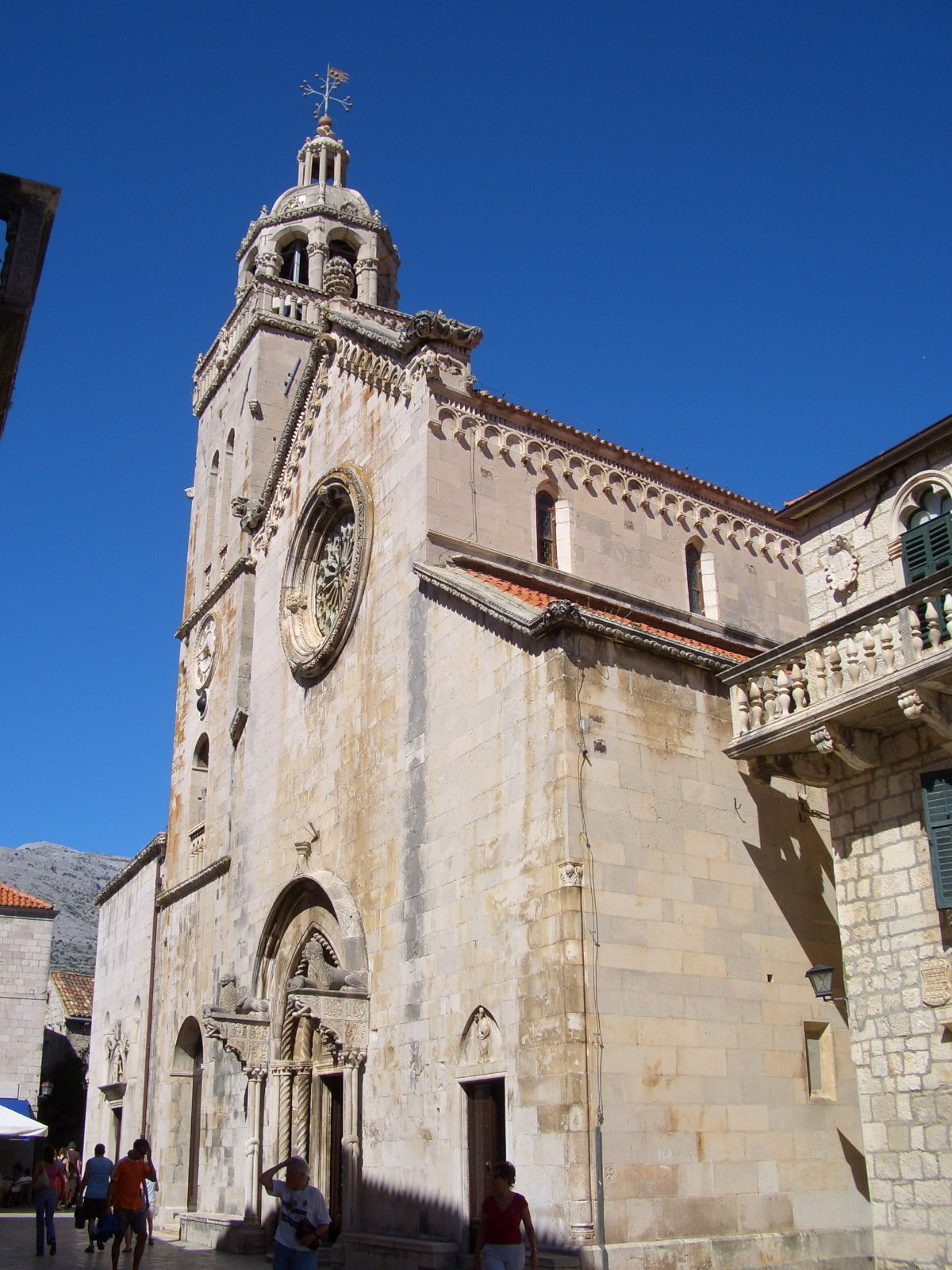 Foto scattata da me a Curzola nell'agosto 05.